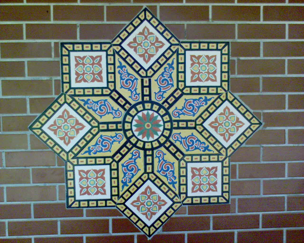 Drehsymmetrische Wandfliese in der Stuttgarter Wilhelma